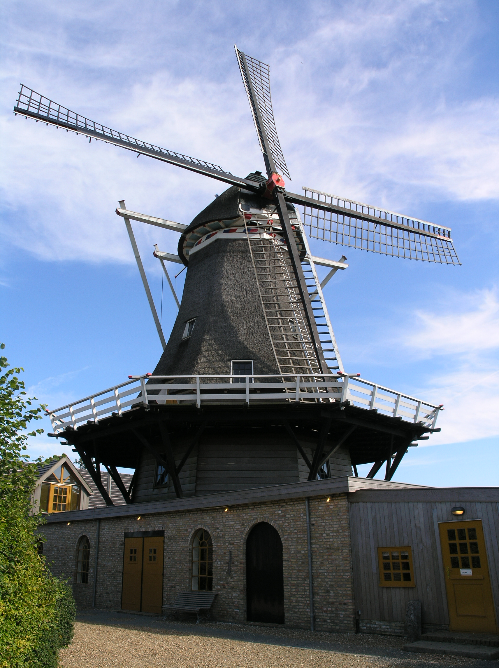 Sexbierum stellingmolen De Korenaar